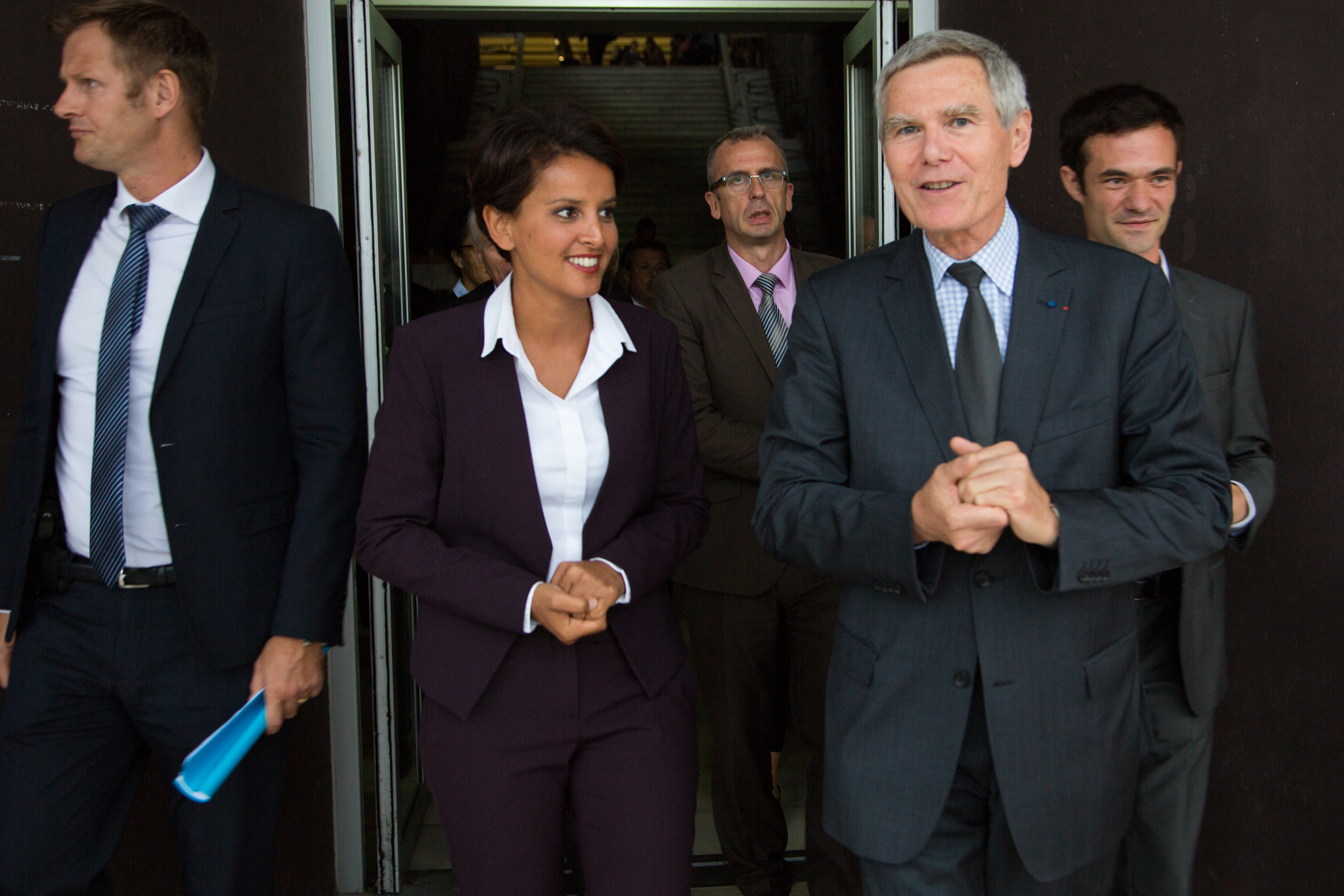 NAJAT VALLAUD-BELKACEM Ministre de l’Education nationale, de l’Enseignement supérieur et de la Recherche et Jacques Biot Président de l'Ecole polytechnique